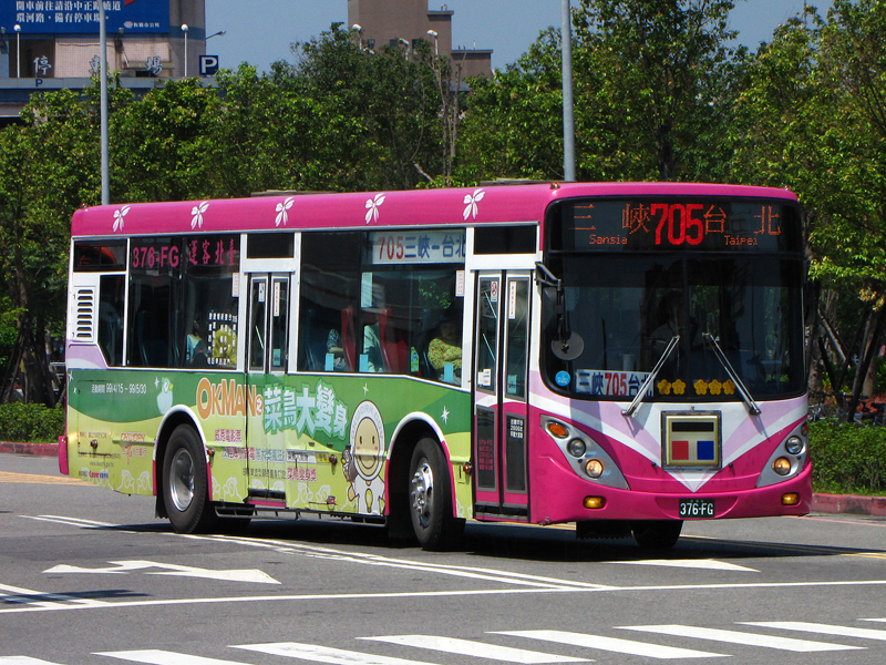 臺北客運2006年HINO ERK2JML大客車376-FG